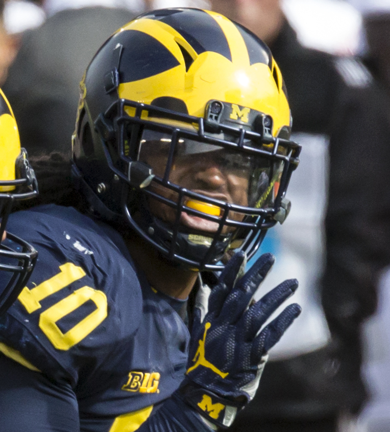 PAB_FBvsRutgers2017_24